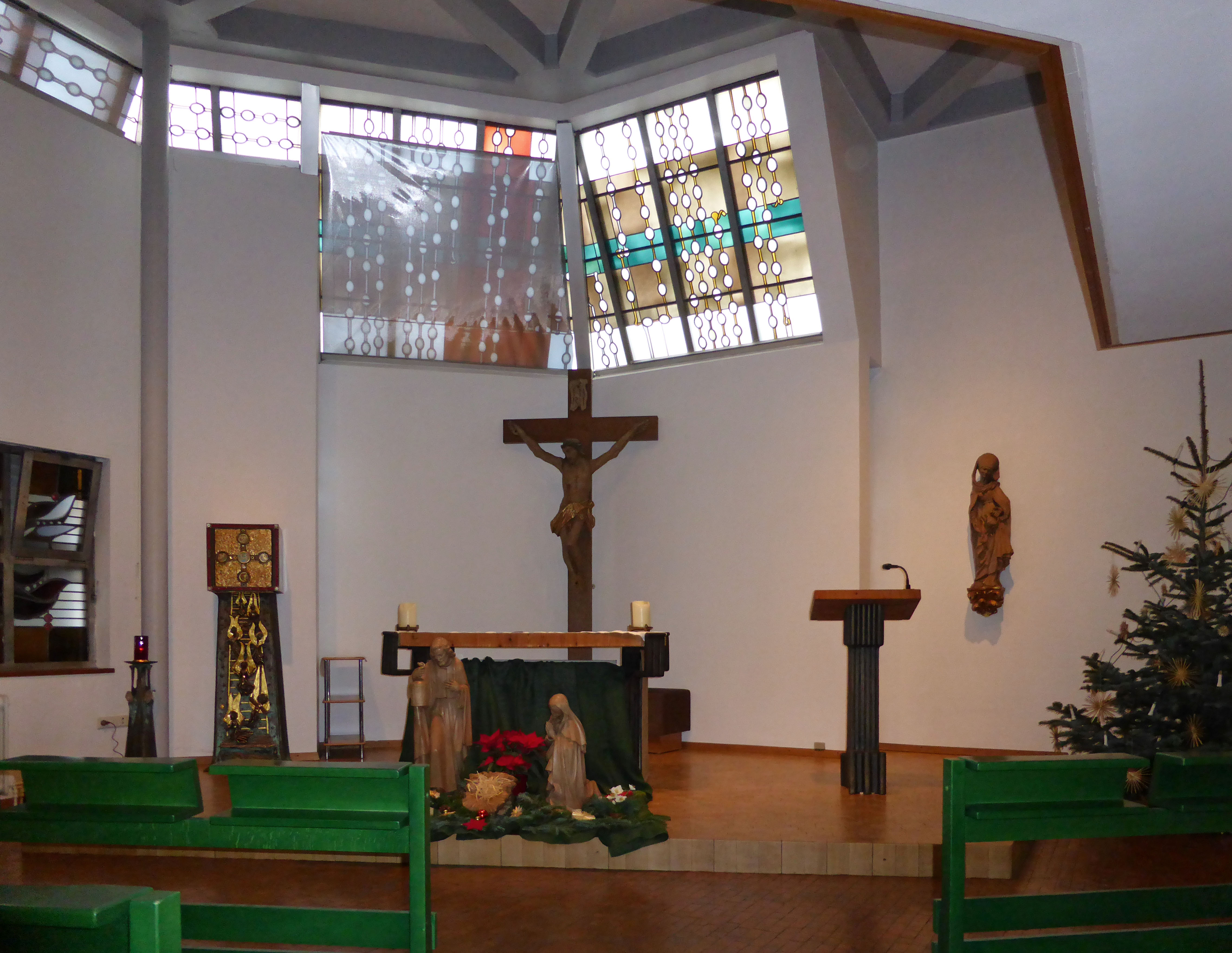 Altarraum der Hauskapelle des Seniorenzentrums St. Elisabeth in Wolfsburg.